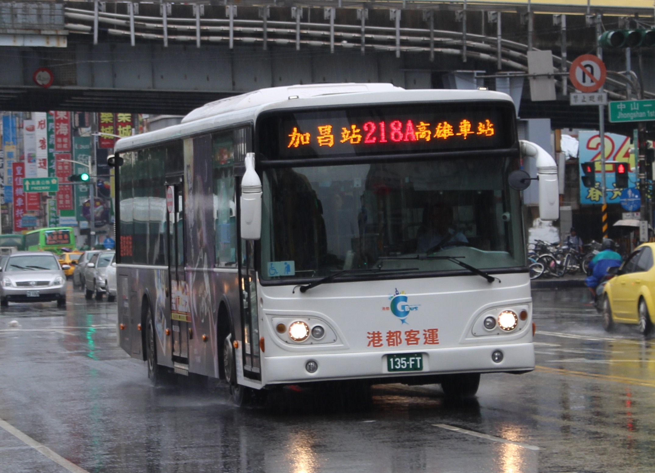 港都客運大宇BS120SN低地板公車135-FT。